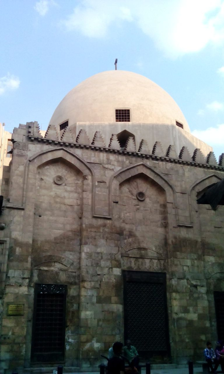 قبة الصالح نجم الدين أيوب بشارع المعز لدين الله الفاطمي بالقاهرة.